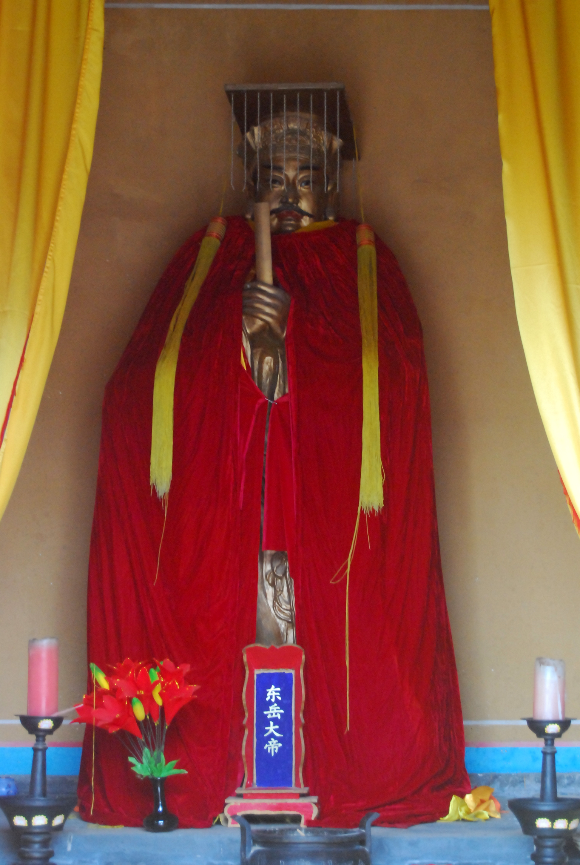 妙峰山娘娘庙东岳大帝